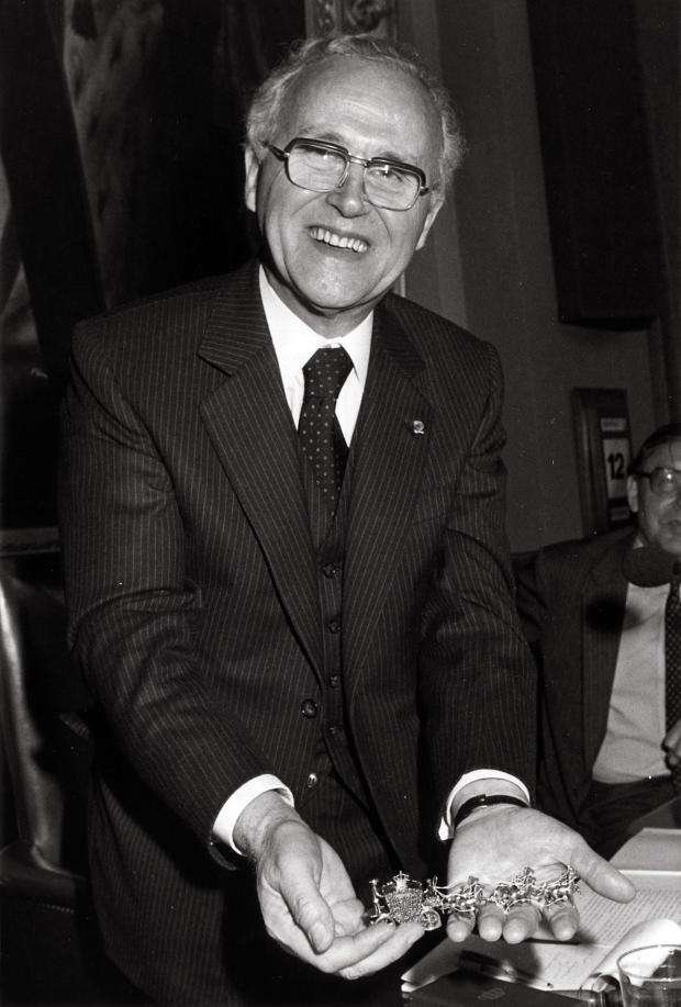 Eerste Kamer-voorzitter T.L.M. Thurlings (KVP) bij zijn afscheid. Den Haag, Nederland, 12 september 1983.